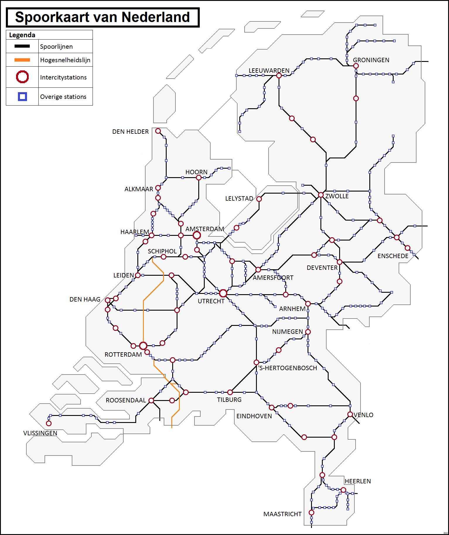 Een kaart met alle spoorlijnen in Nederland + stations met hun naam.